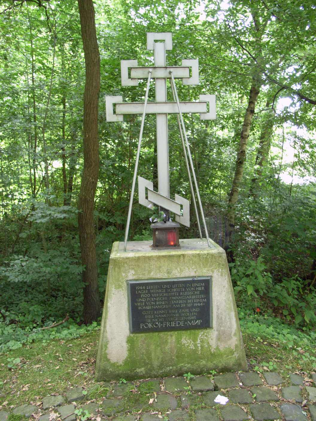 Gedenkkreuz für das Zwangsarbeiterlager Iktebach bei Jülich, NRW